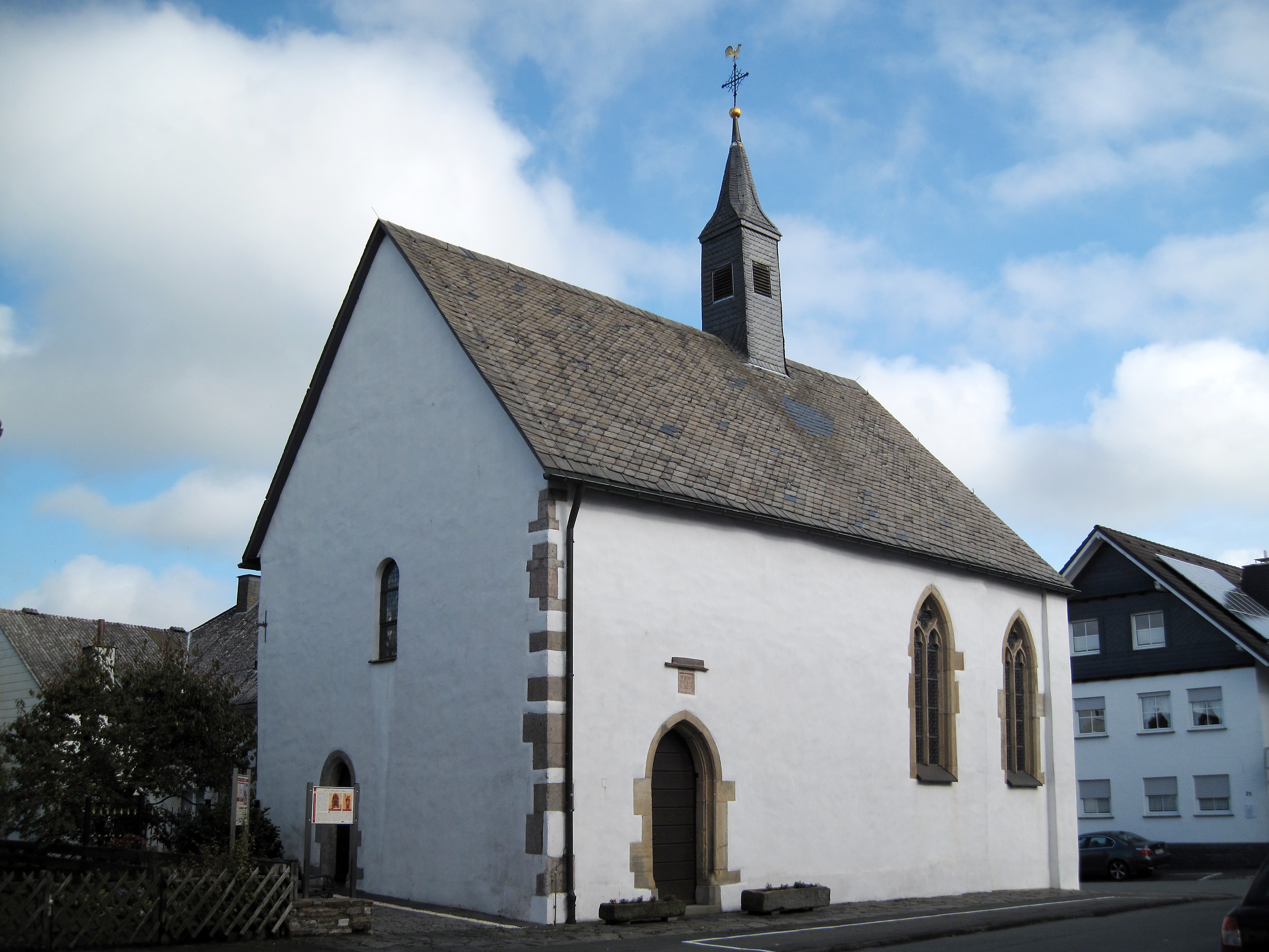 Sankt Andreas Kapelle, Kirchenstraße 13, Medebach This image shows a heritage building in Germany, located in the North Rhine-Westphalian city Medebach (no. 4).